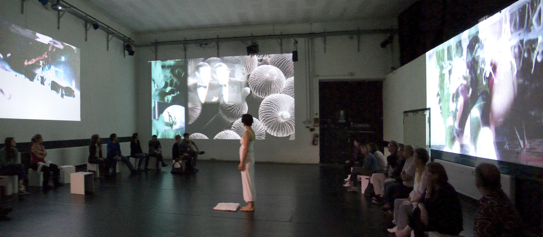 Bühnenbild zu "white" (2014); perfomance von und mit Patricia Leinhos; Konzeption P. Leinhos, J. Deck, C. Steiger